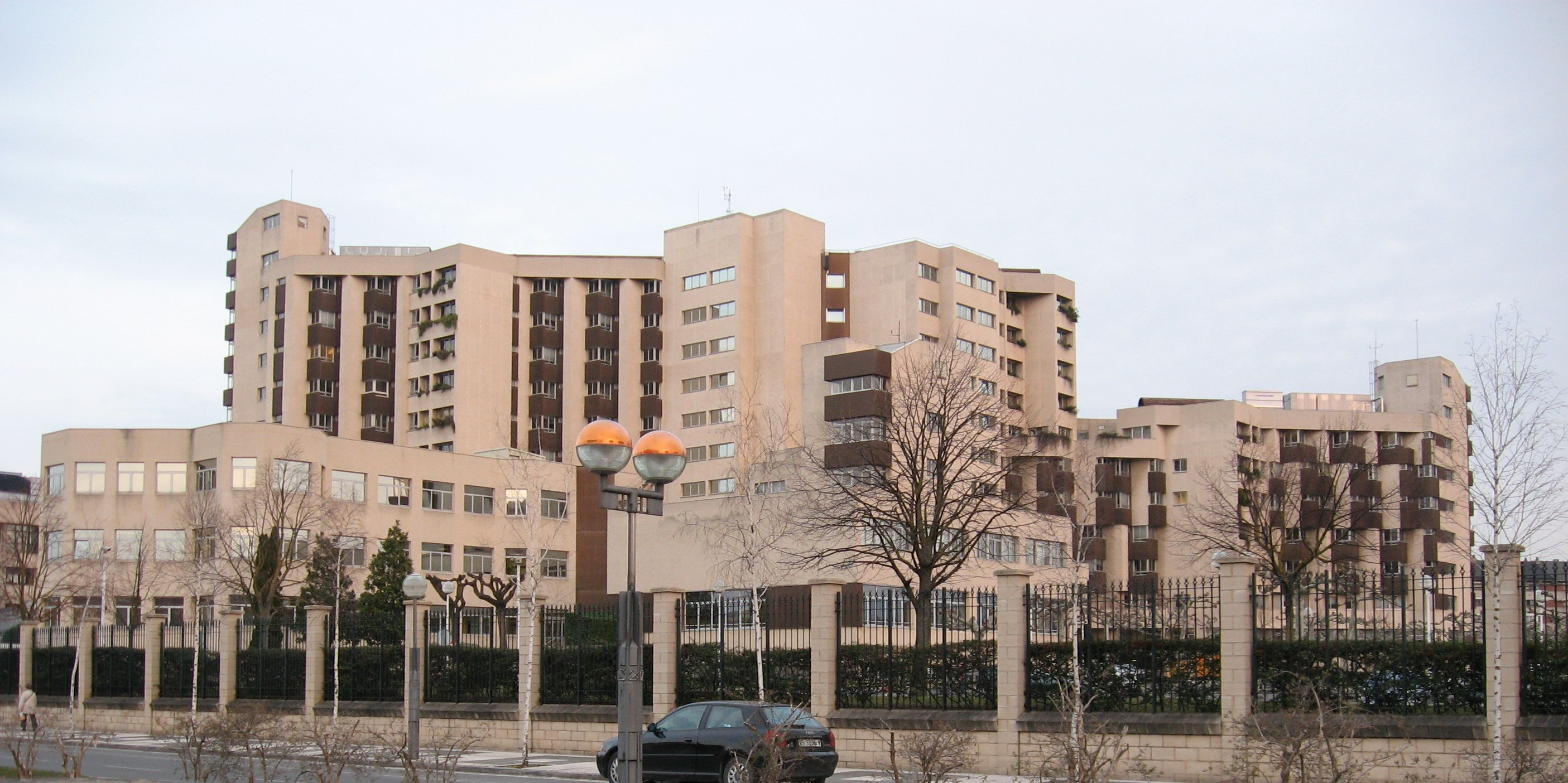 Desc: Edificio del Gobierno Vasco en Vitoria